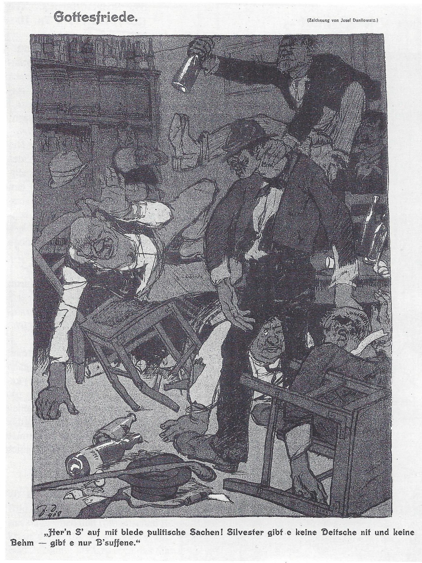 Karikatur auf ein versöhnliches Besäufnis von Deutschen und Tschechen („Böhmen“) in einem böhmischen Wirtshaus zum Jahresende 1908